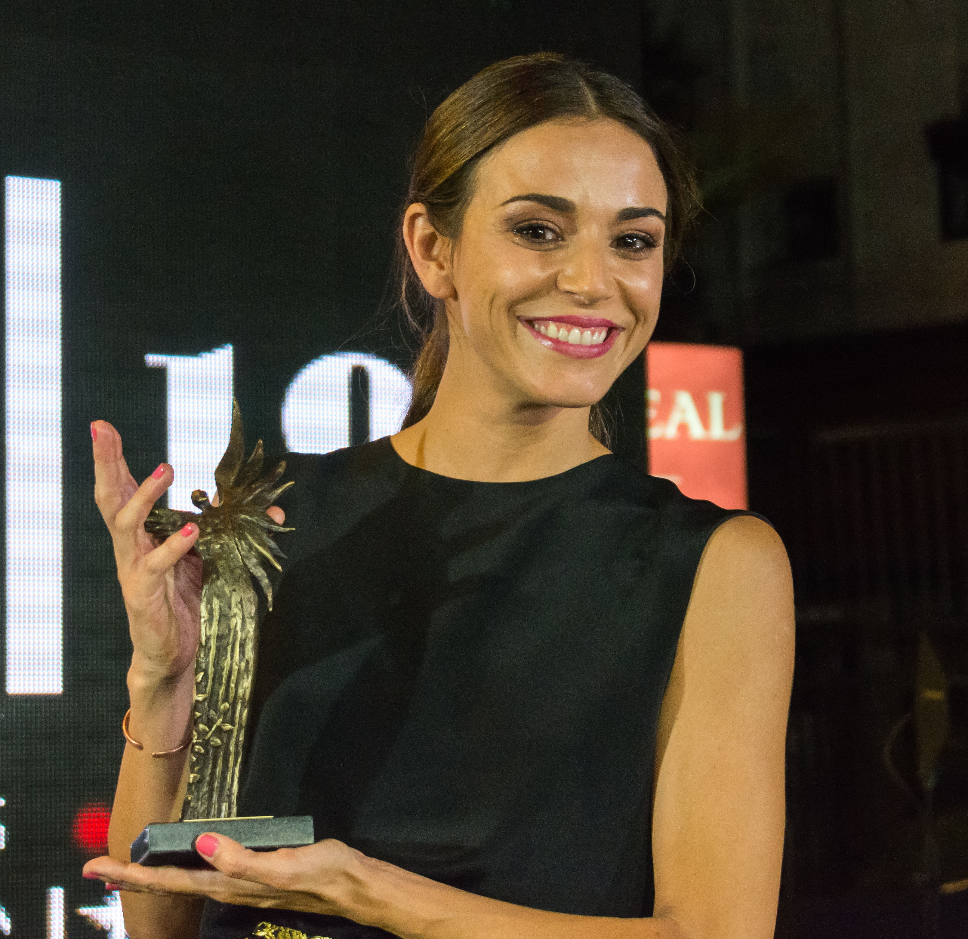 Ignacia Baeza, Premios Caleuche, Teatro Oriente, Providencia, Santiago, Región Metropolitana de Santiago, Chile.